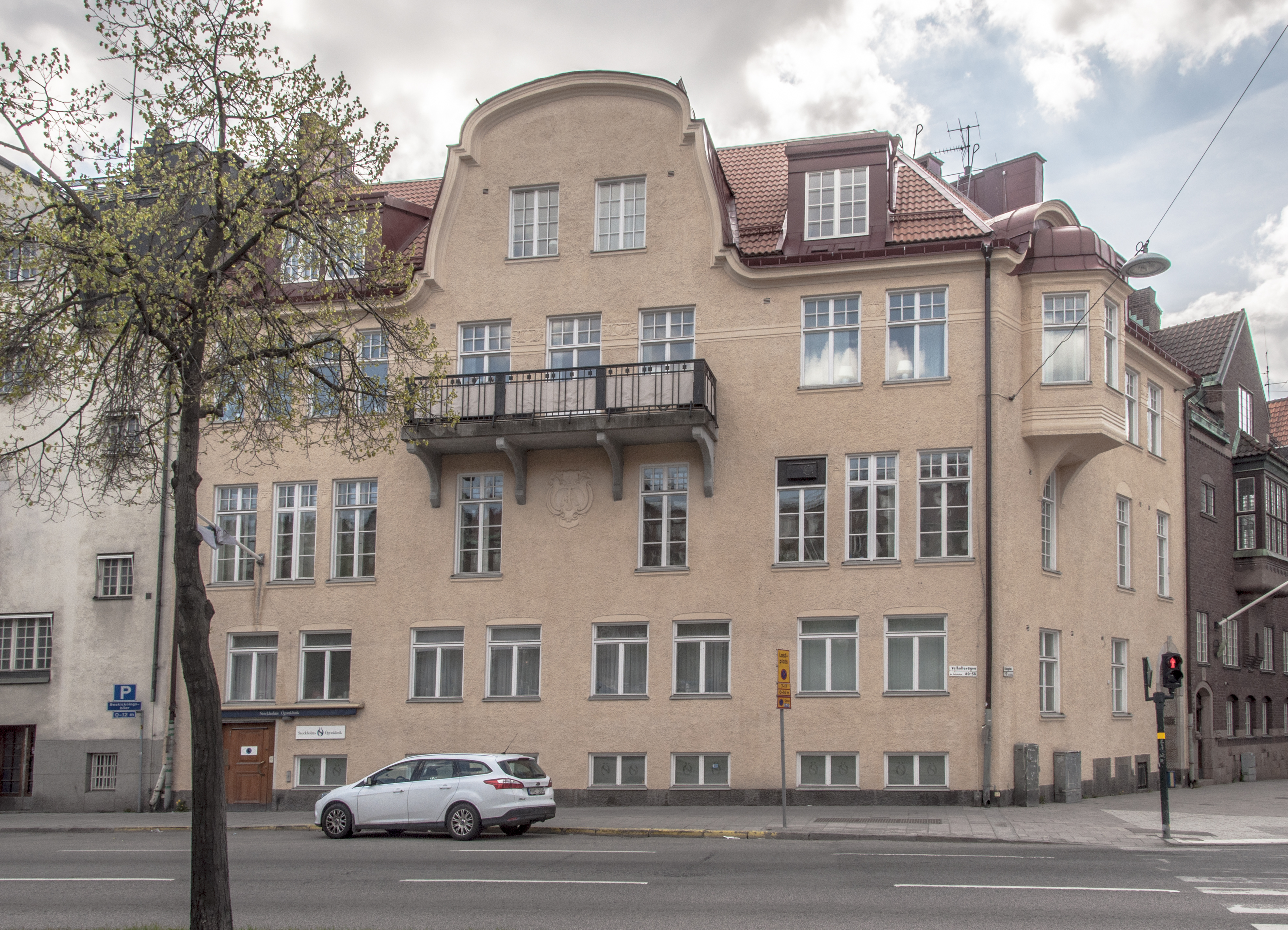 Tofslärkan 8, Odengatan 1, Valhallavägen 58 Nybyggnadsår 1909 - 1911, Albin Brag (Arkitekt) Georg Hesselman (Byggmästare) Johan Arvedson (Byggherre)